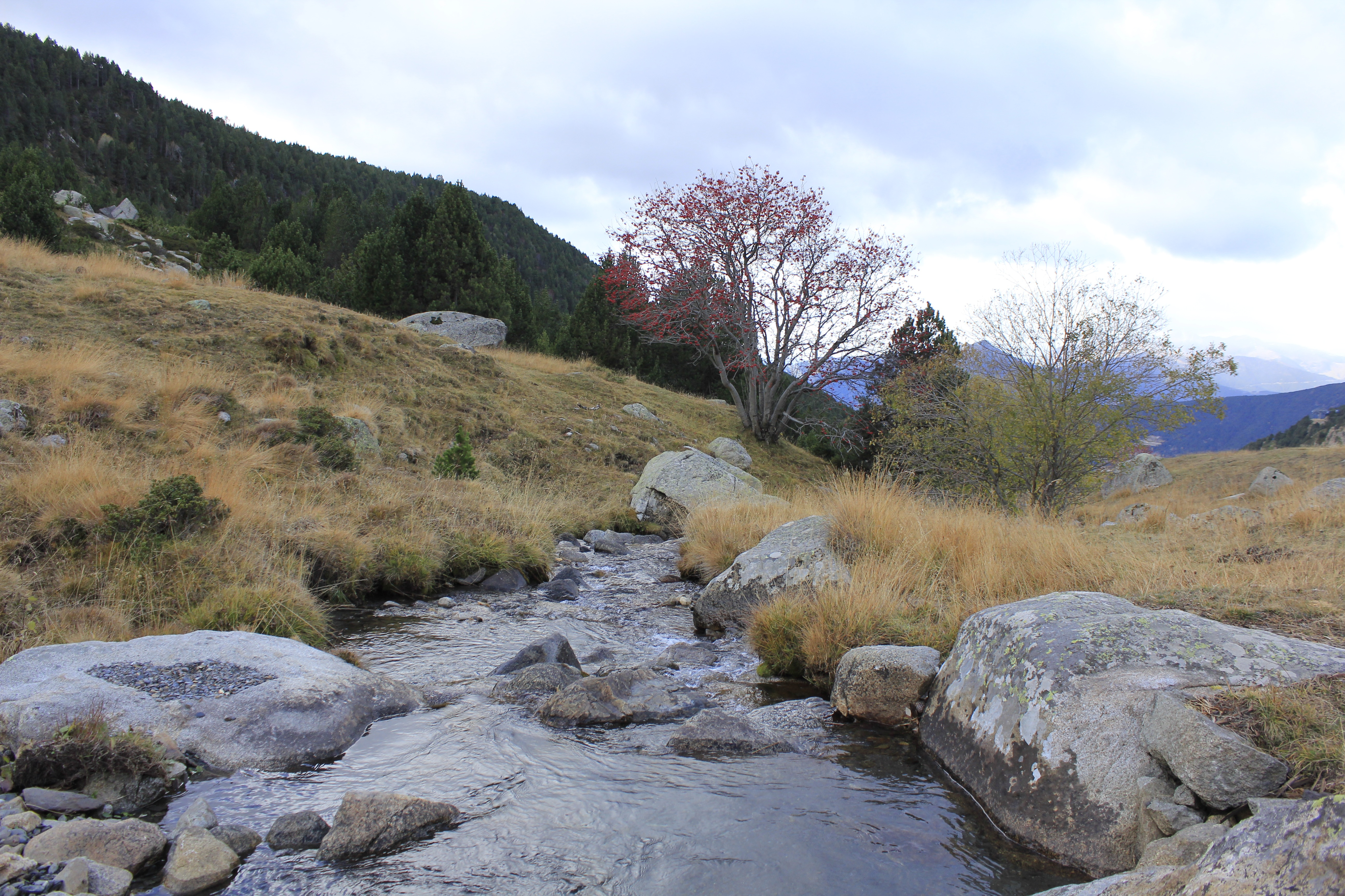 Riu dels Cortals d'Encamp This is a a photo of a river in Andorra with id: IEA-R-23